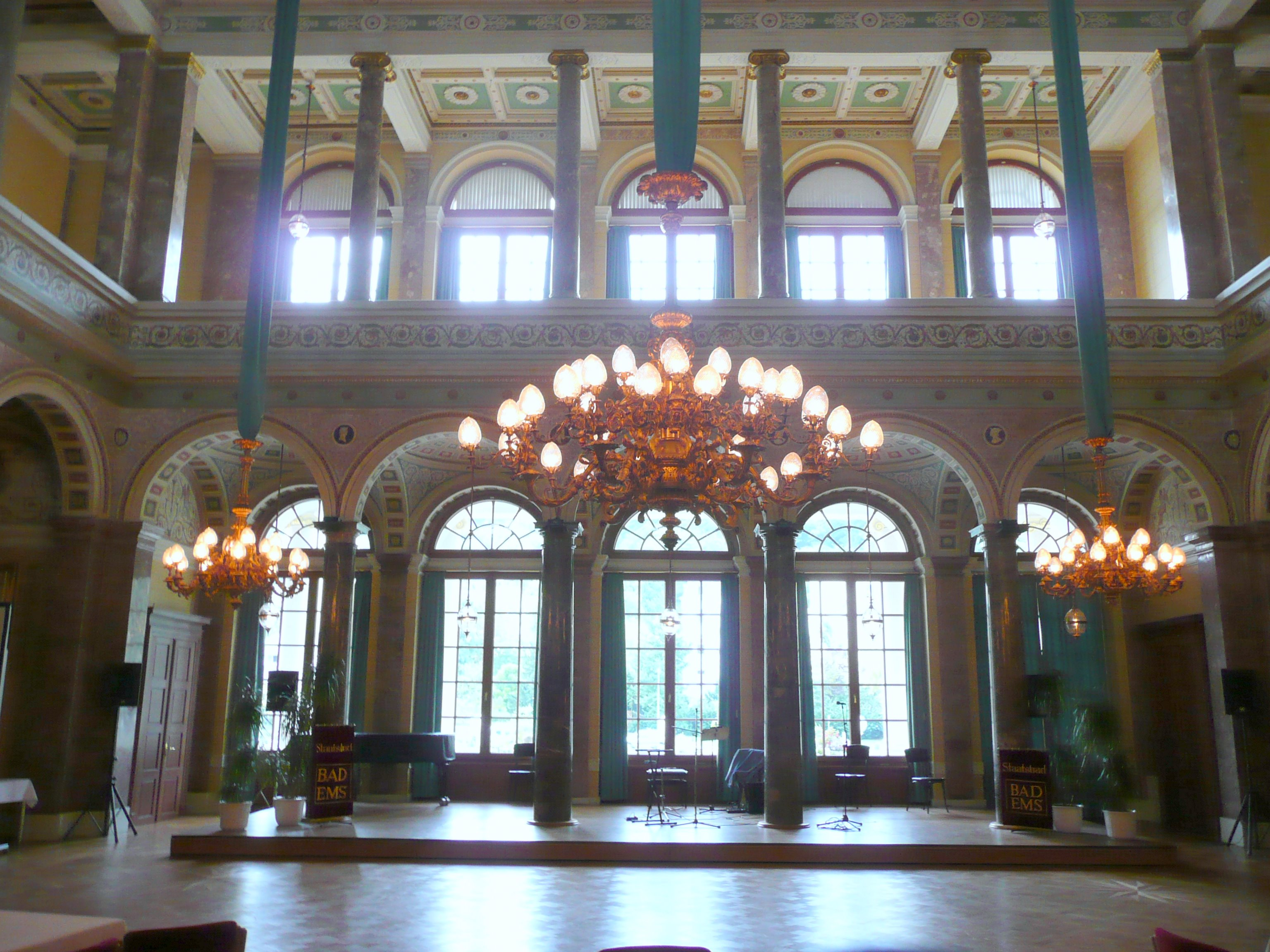 Kursaal in Bad Ems